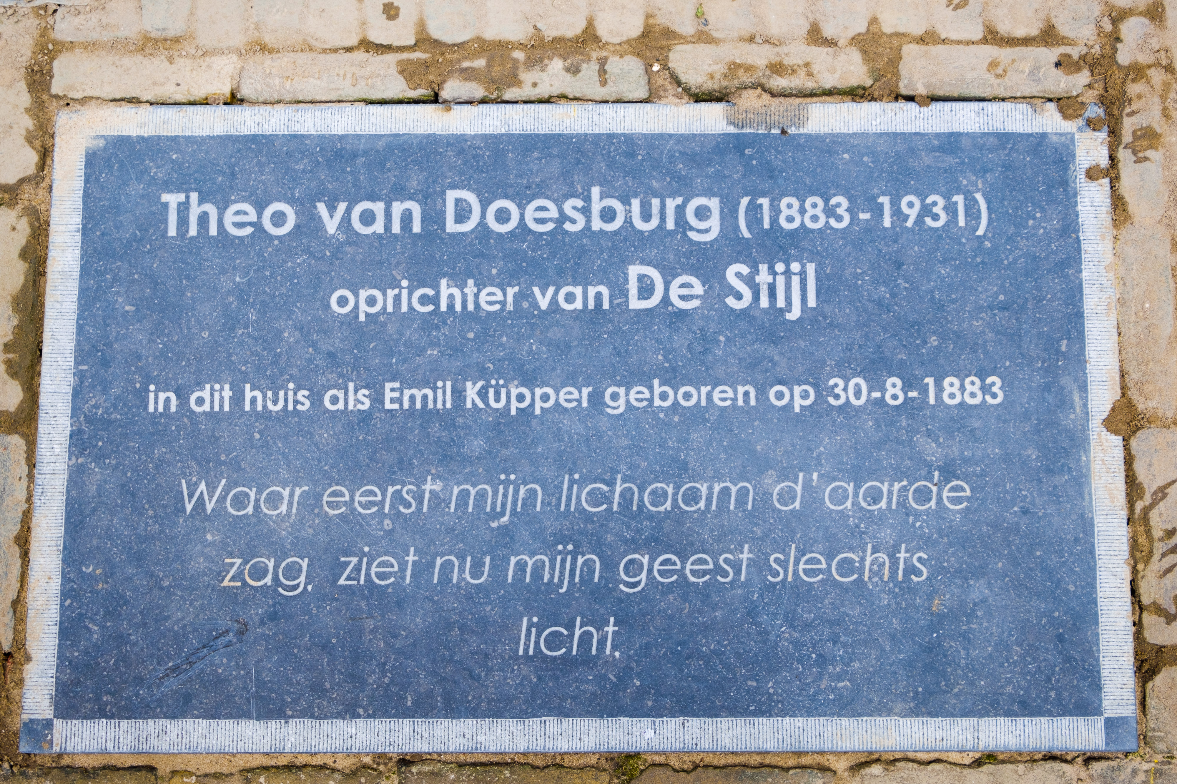 Op 30 augustus 2019 werd bij de Teelingstraat nr. 13 in Utrecht een gedenksteen onthuld voor Theo van Doesburg, waar hij op 30 augustus 1883 geboren was. Theo van Doesburg heeft veel invloed gehad op de kunstbeweging De Stijl en op de aanverwante kunstbeweging Bauhaus In Duitsland. Van Doesburg was een markante kunstenaar, architect, schilder, dichter en interieurontwerper. Niels Bokhove en Marije Lieuwens hebben het initiatief genomen voor de gedenksteen. Deze onthulden zij samen met wethouder Anke Klein en Marischka Verbeek. Acteur en voordrachtskunstenaar Boris van den Wijngaard droeg het gedicht “Nacht” van Theo van Doesburg voor. De gedenksteen is mogelijk gemaakt door de werkgroep Directe Voorzieningen van de gemeente Utrecht die zich inzet voor het aanbrengen en behoud van historische en karakteristieke elementen in het Utrechtse straatbeeld. Tekst op de gedenksteen: Theo van Doesburg (1883-1931) oprichter van De Stijl In dit huis als Emil Küpper geboren op 30-8-1883 Waar eerst mijn lichaam d'aarde zag, ziet nu mijn geest slechts licht